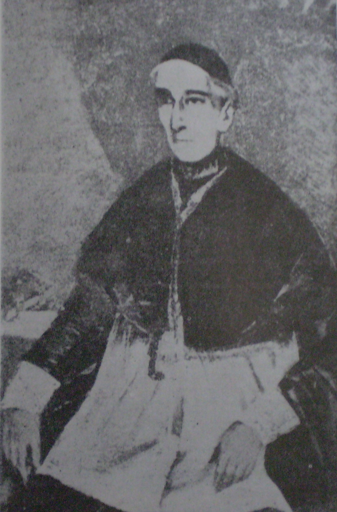 Pedro Juan Vidal, delegado a la Asamblea de 1813